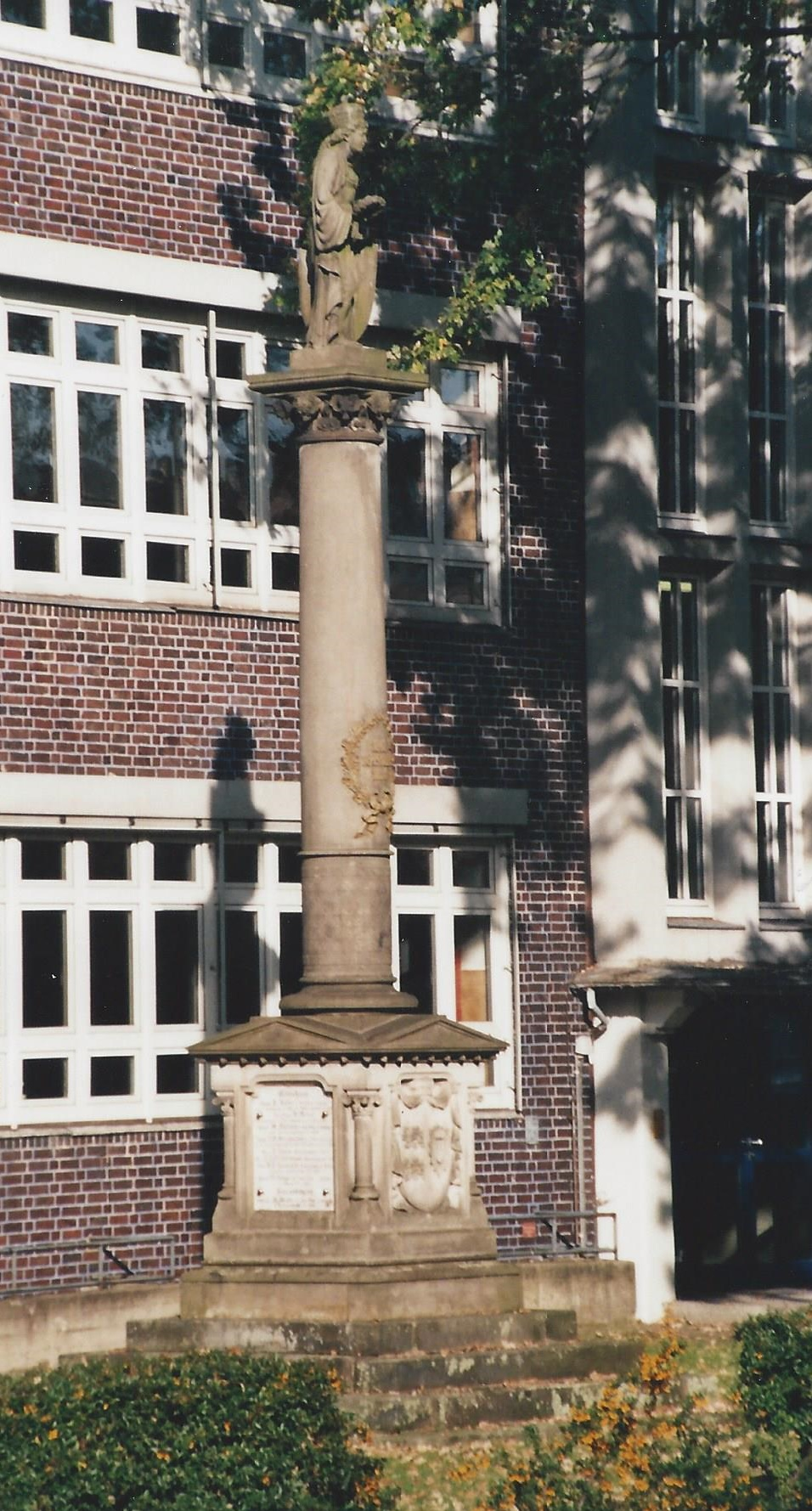 Denkmal für die Schleswig-Holsteinische Erhebung 1848–1851 vor der ehemaligen Realschule am Propstenfeld (heute Anne-Frank-Gemeinschaftsschule)